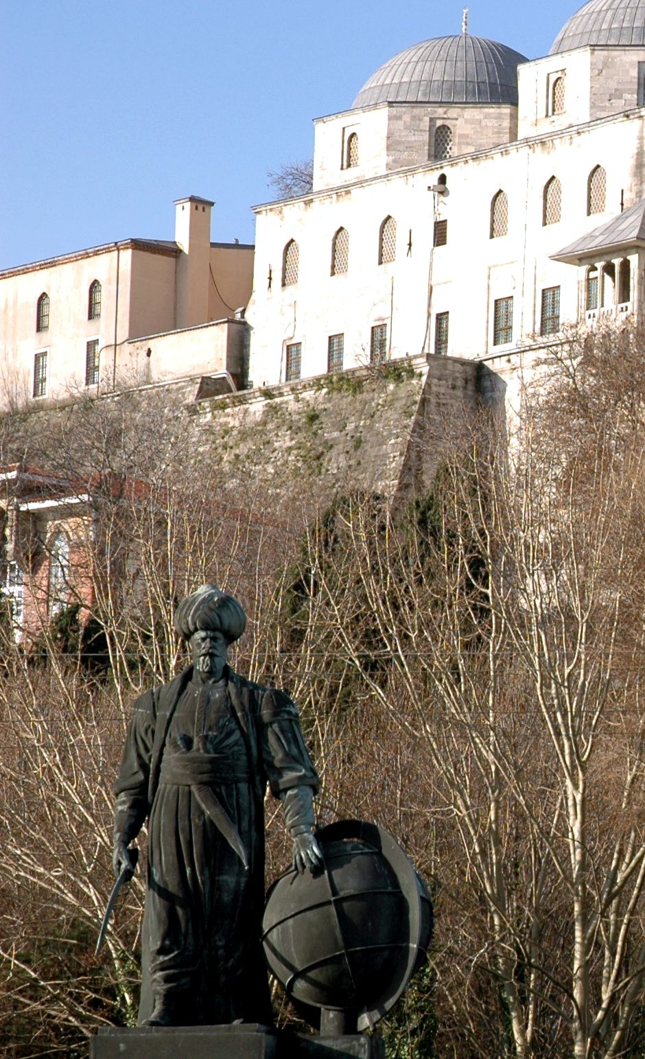 Istanbul - Estàtua de Turgut Reis sota el Palau de Topkapi